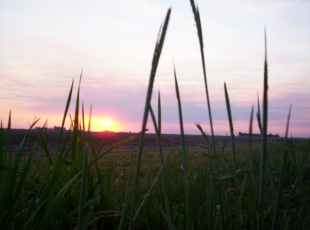 campo argentino